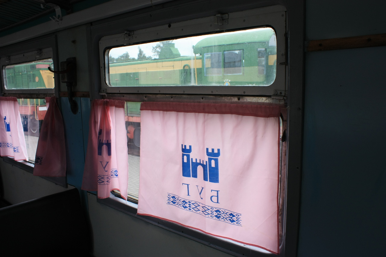 Головной вагон дизель-поезда ДР1-045, окно изнутри